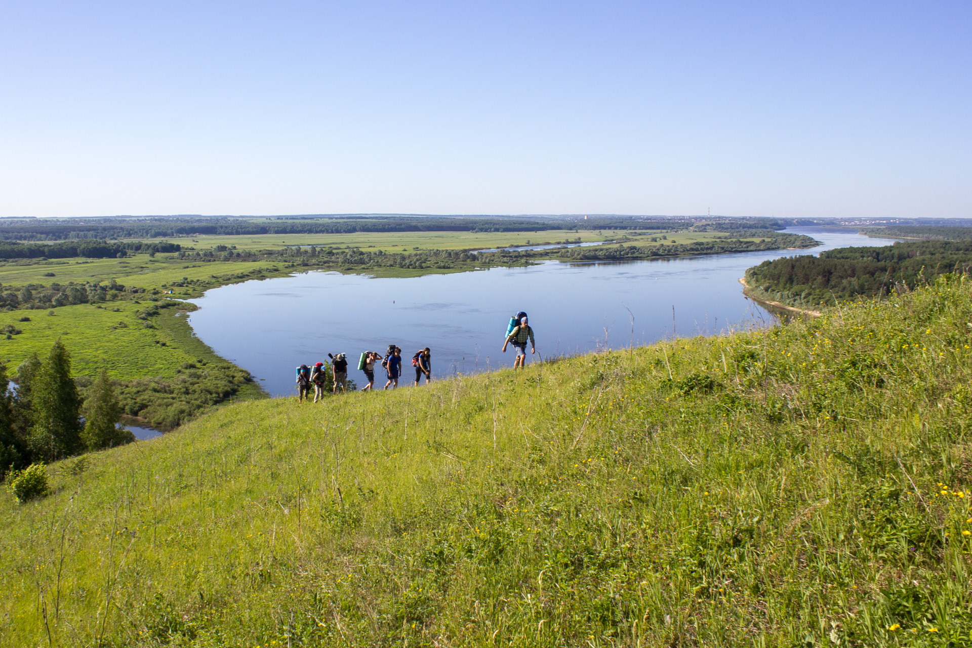 Откос